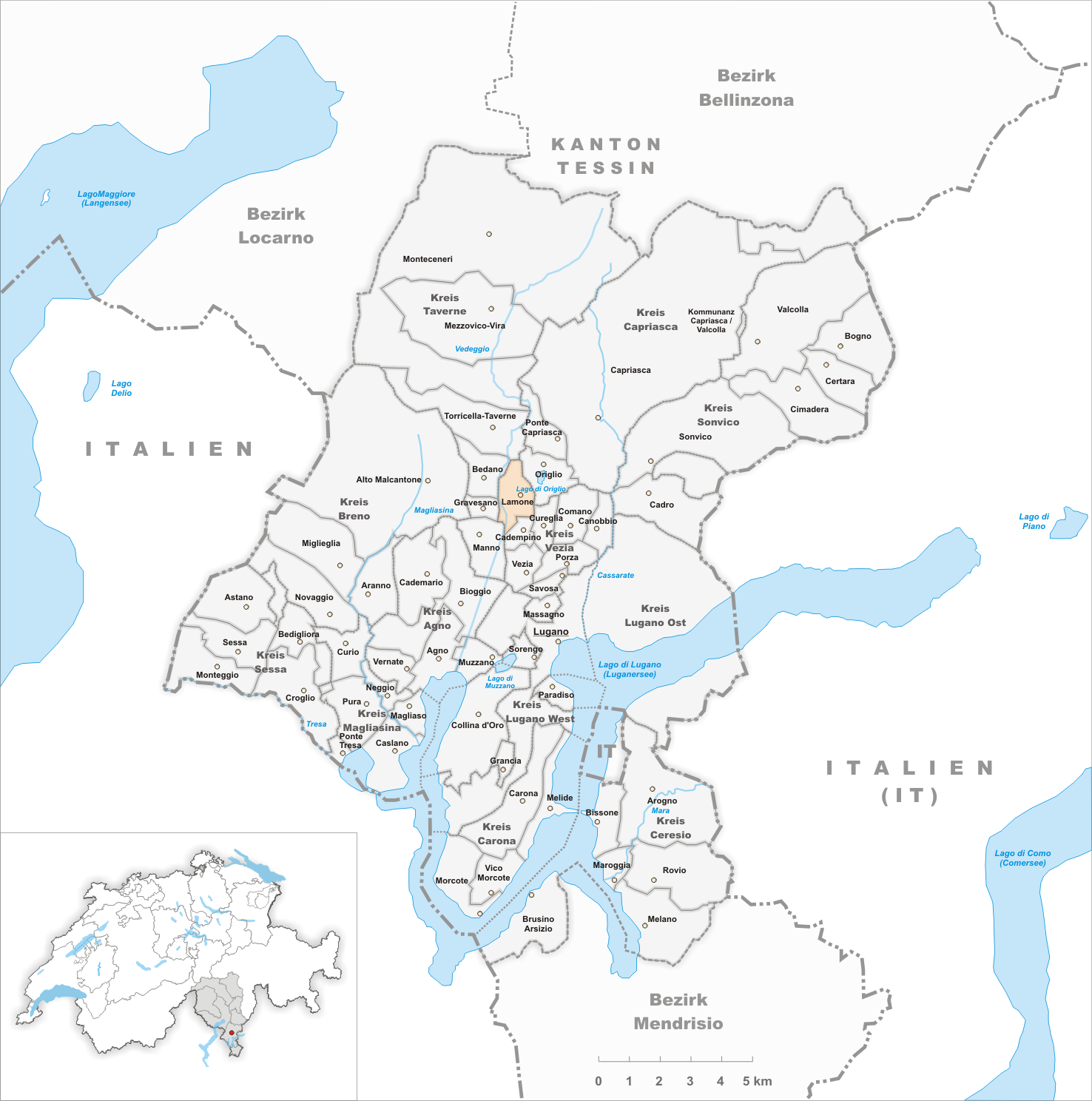 Municipality Lamone